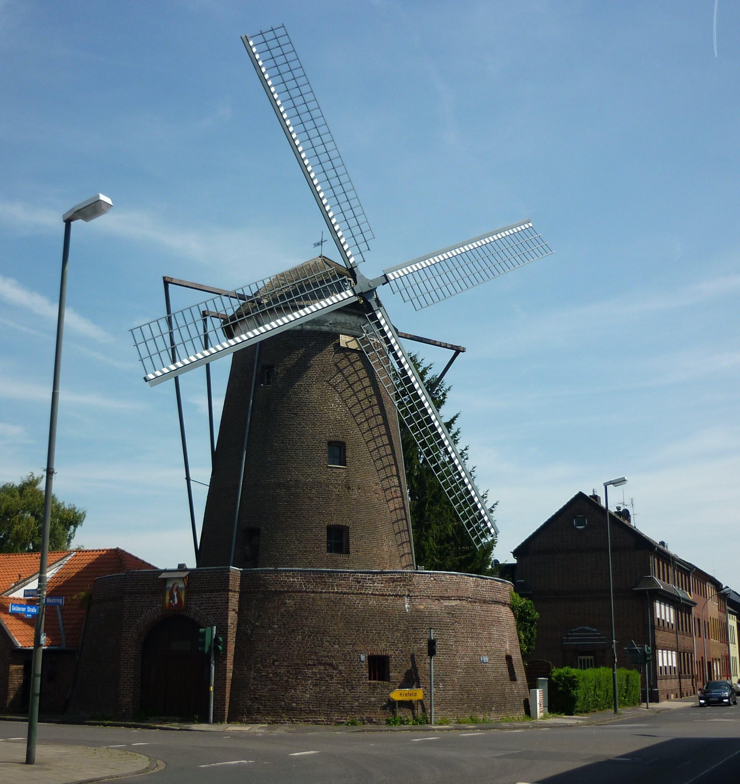 St. Tönis, Nordring 96, Streuff-Mühle This image shows a heritage building in Germany, located in the North Rhine-Westphalian city Tönisvorst (no. 3).